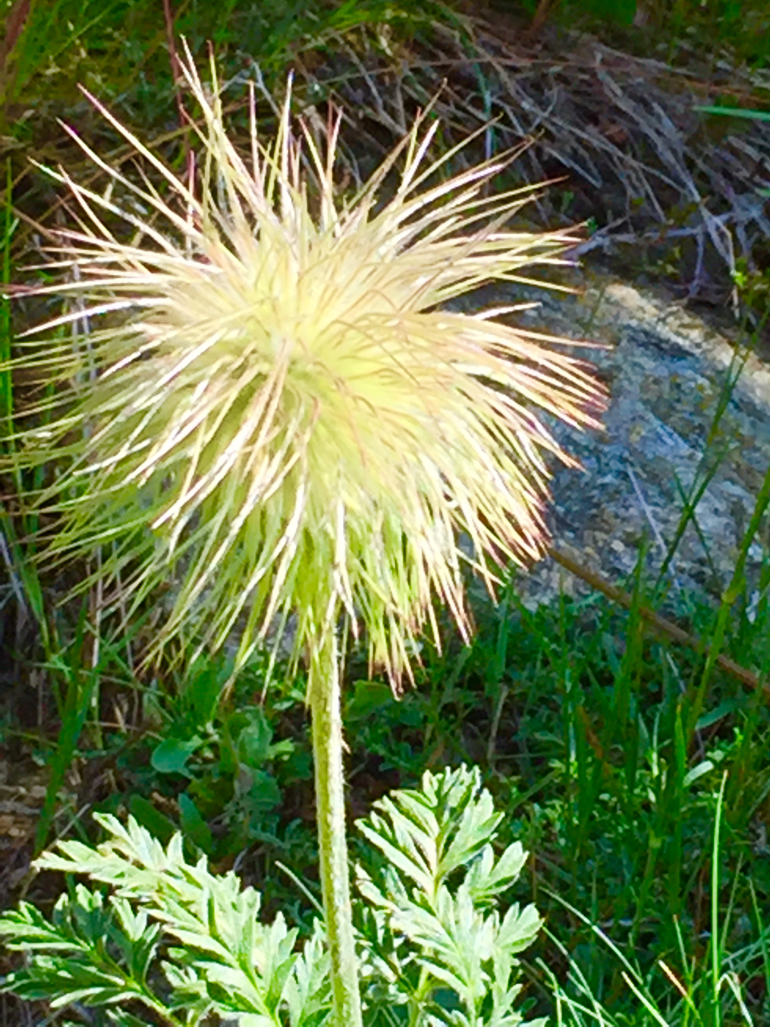 Pulsatille soufrée en fruit dans la réserve naturelle de Prats-de-Mollo-la-Preste (Pyrénées-Orientales).